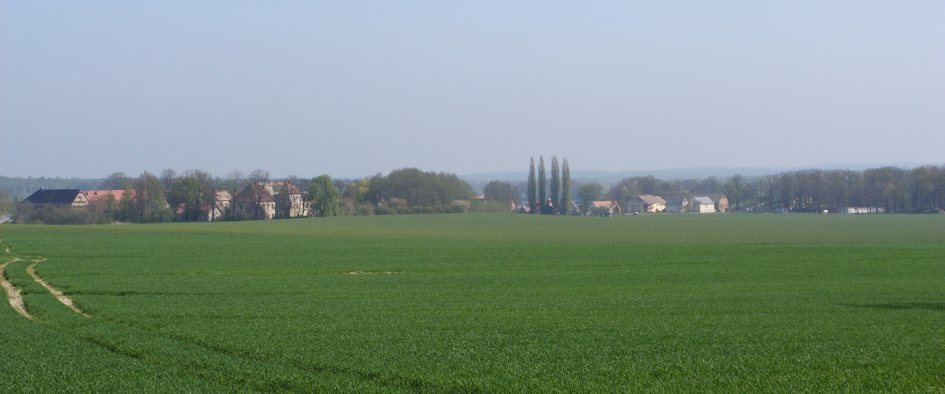 Westansicht von Jeßnitz, Gemeinde Puschwitz, Landkreis Bautzen. Hornjoserbsce: Napohlad Jaseńcy (gmejna Bóšicy) ze zapada.